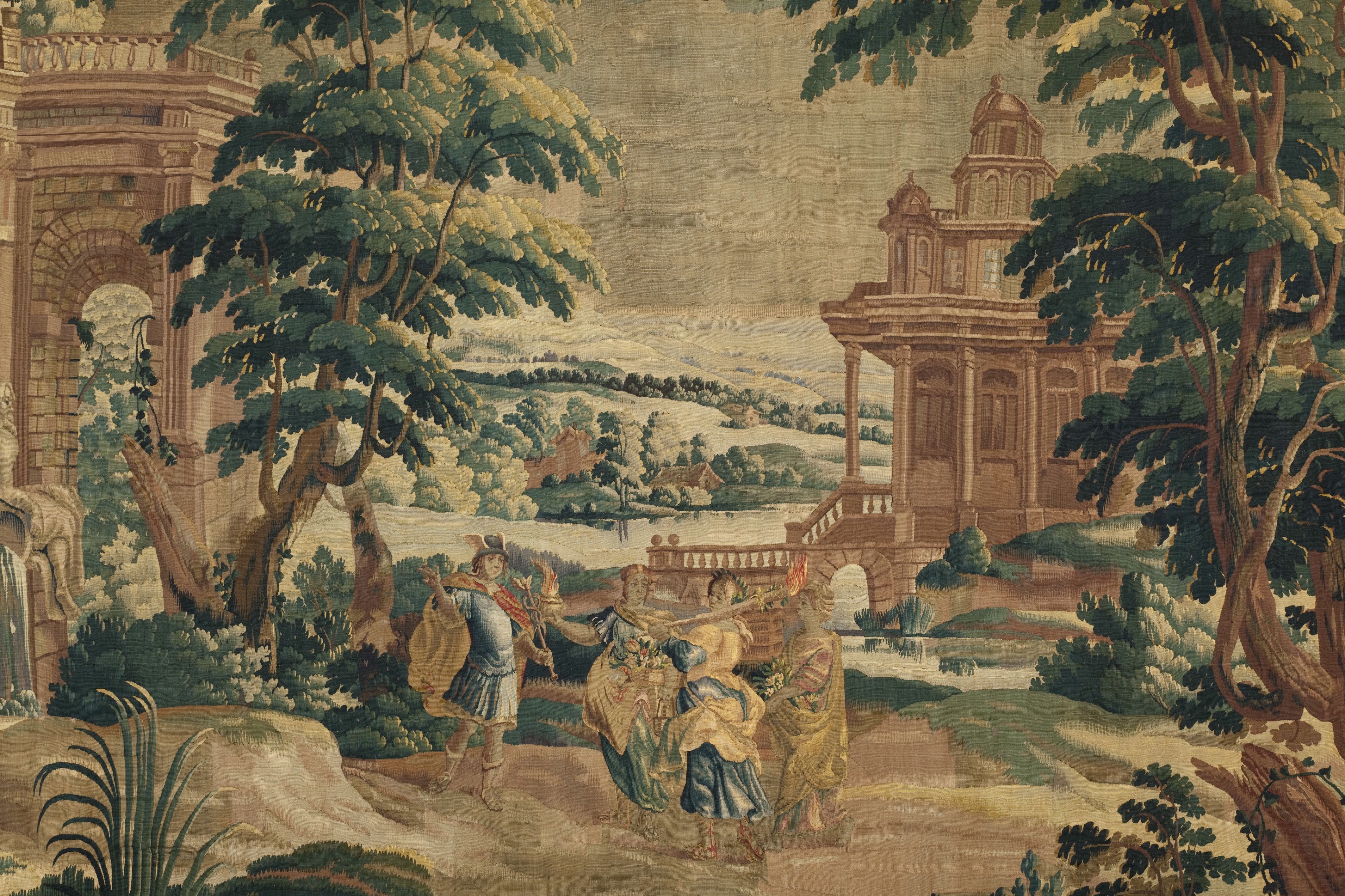 Stadhuis Nijmegen: Interieur, gobelin in de Burgerzaal: De reeks van Metamorfosen van Ovidius. Mercurius, Herse en Aglaurus. Detail. T9 (opmerking: Gefotografeerd voor het boek 'Stadhuis van Nijmegen')